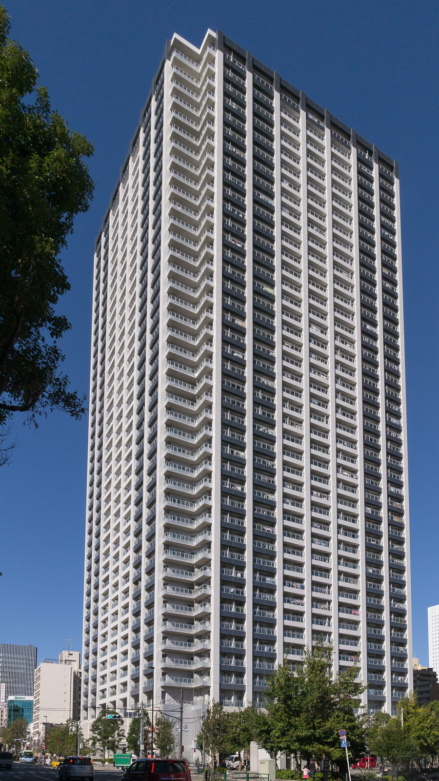 ライズシティ池袋エアライズタワー、東京都豊島区東池袋。